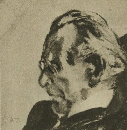 Angelo Zeyer: Portrét Augusta Švagrovského (uhel)